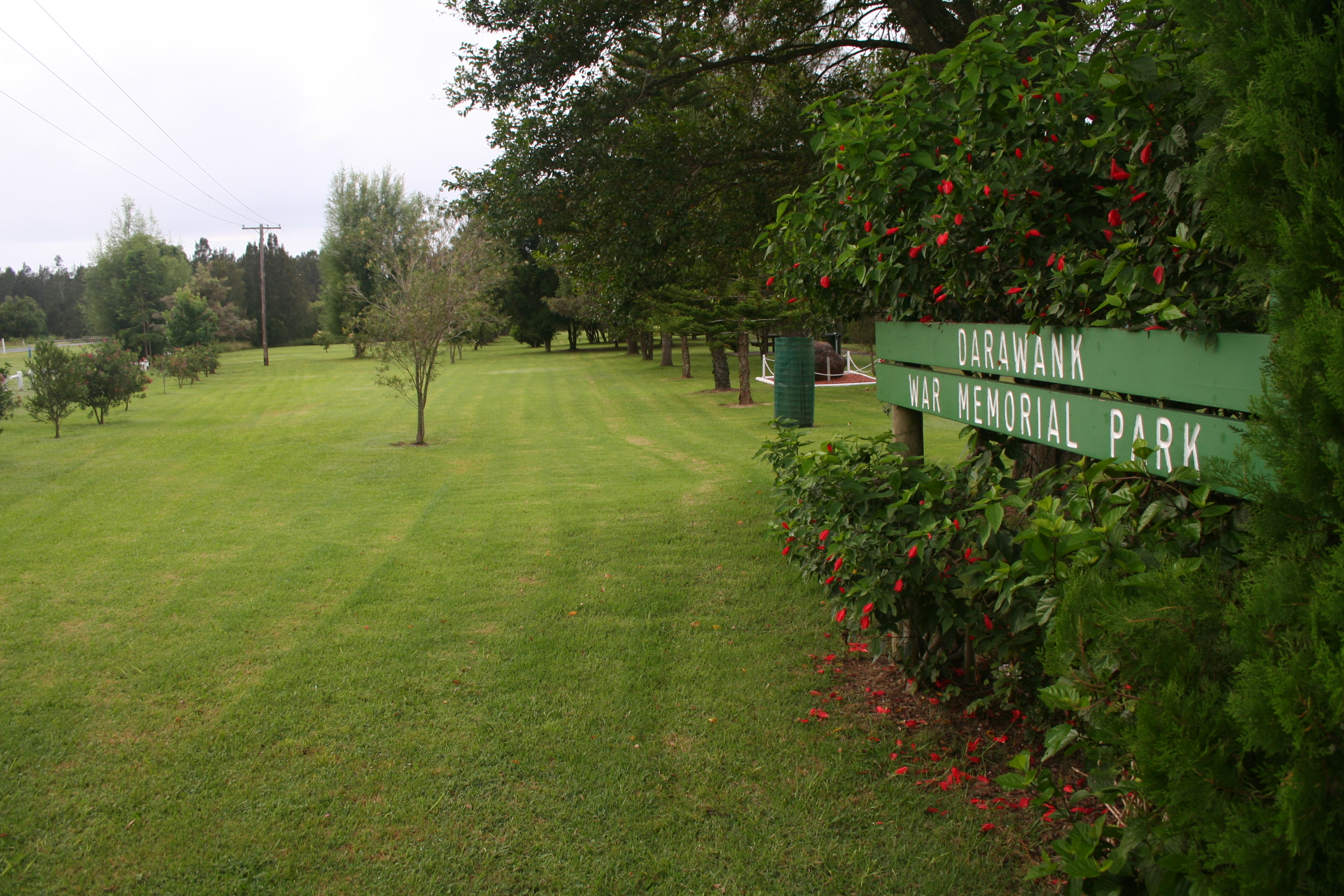 Darawank War Memorial Park